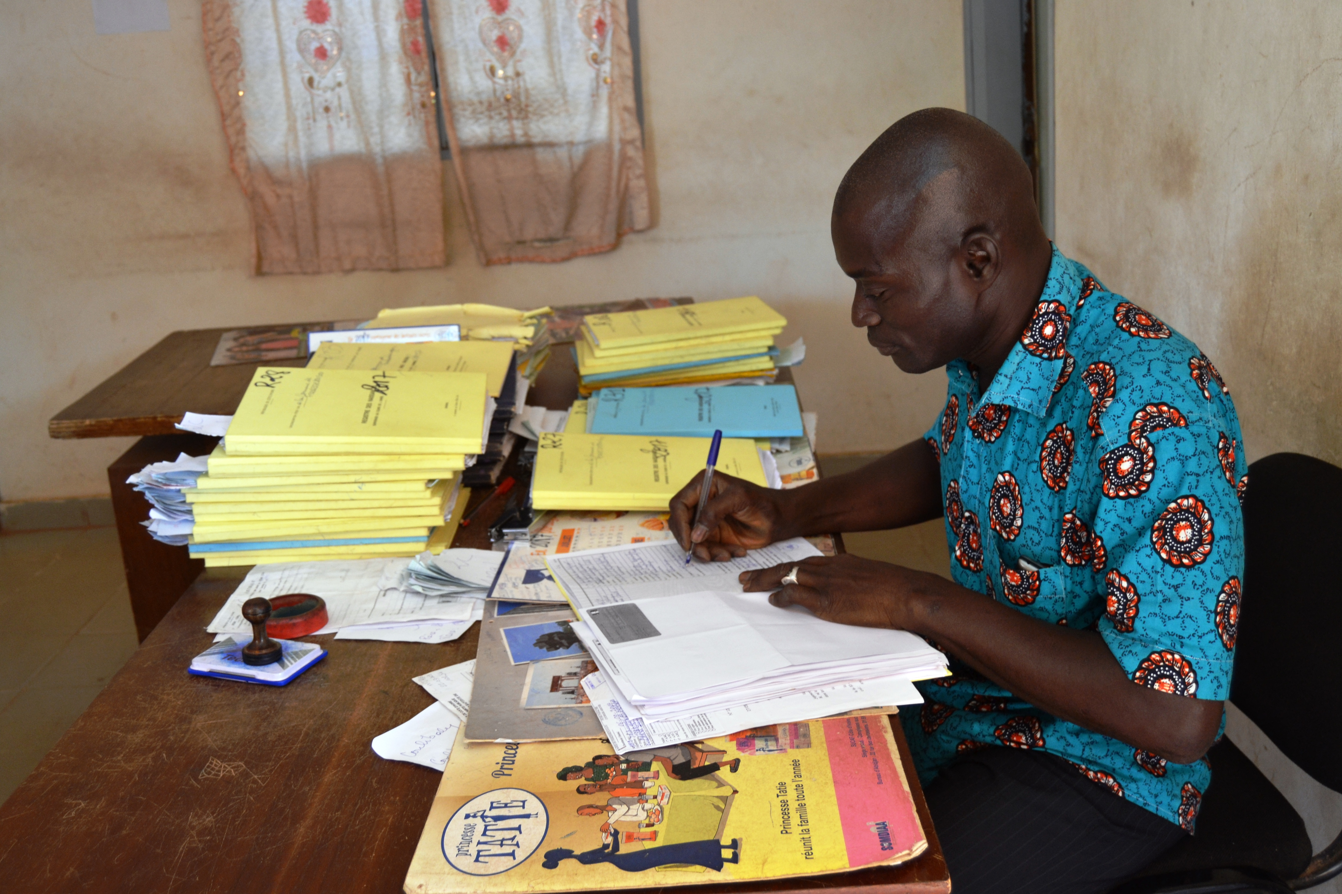 Cet agent a en charge la retranscription des actes de naissance. This is an image of "African people at work" from Ivory Coast